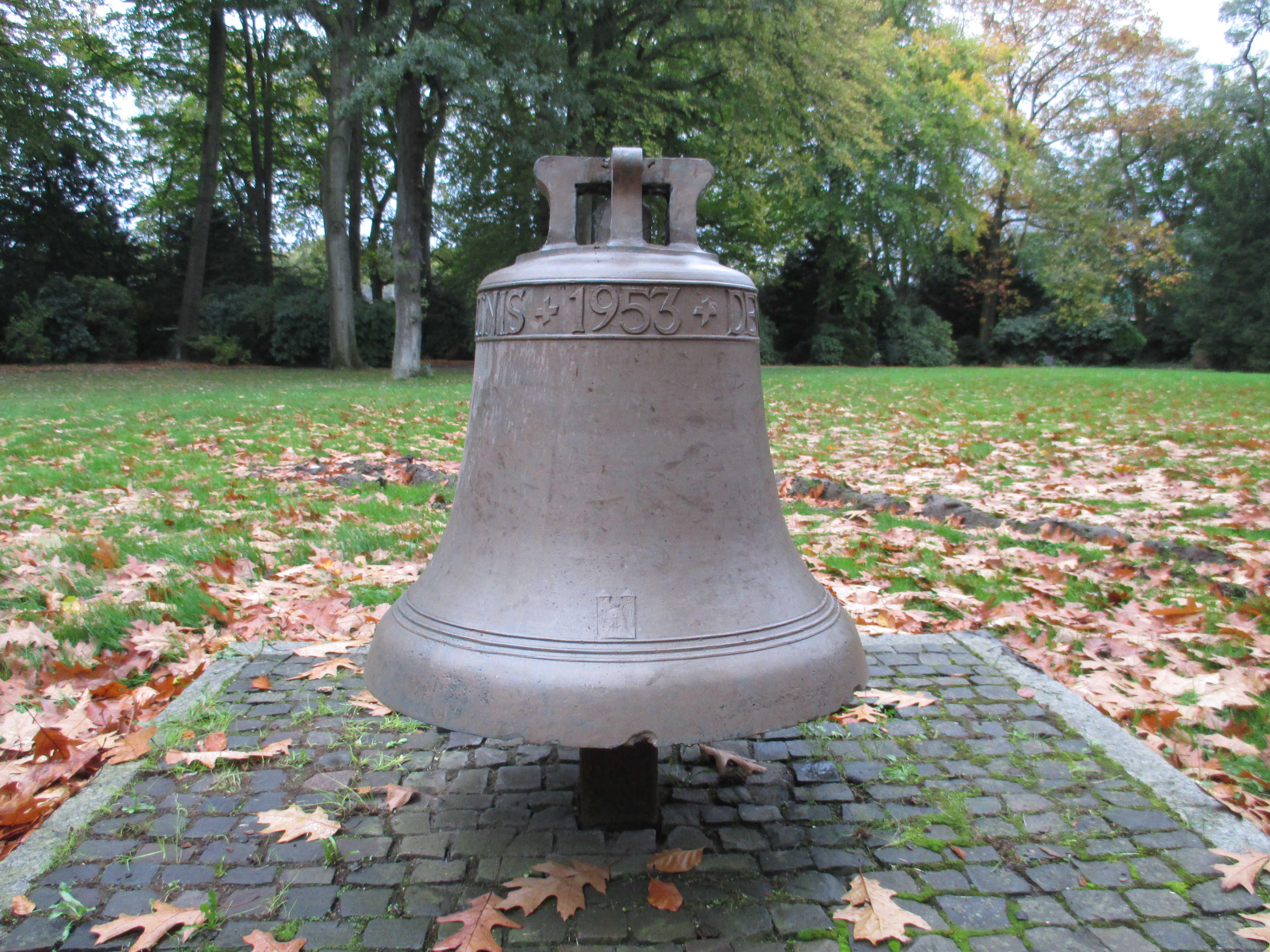 Glocke des ehemaligen Krematoriums auf dem Waldfriedhof Duisburg.